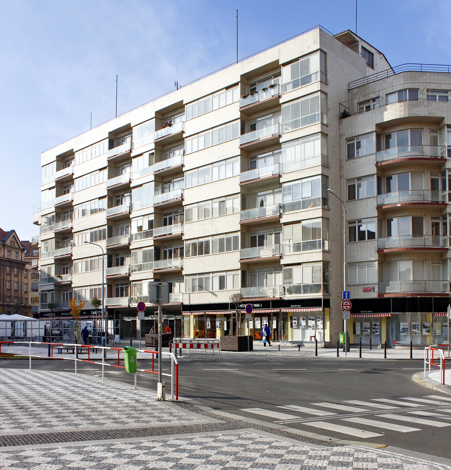 Skleněný palác (původně Domy Zemské banky), Praha 6-Bubeneč, nám. Svobody, Čsl. armády, Terronská 728/1, architekt: Richard Ferdinand Podzemný, dokončeno 1937